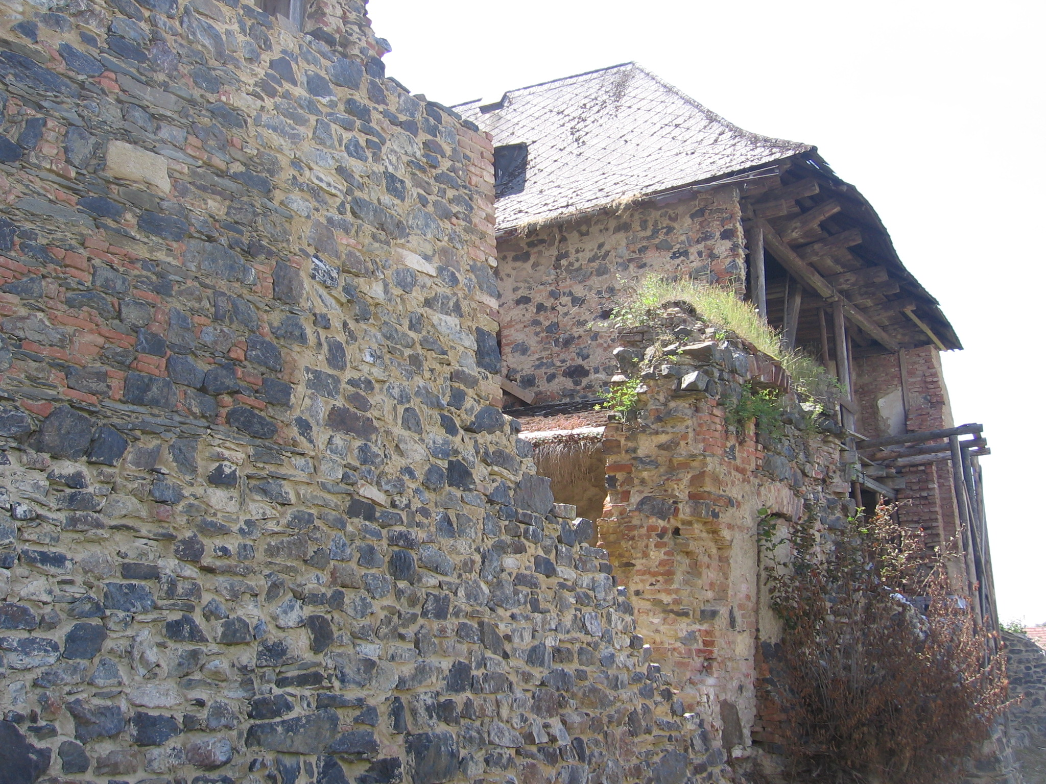 Tvrz, v areálu hosp. dvora čp. 4, Řenče.